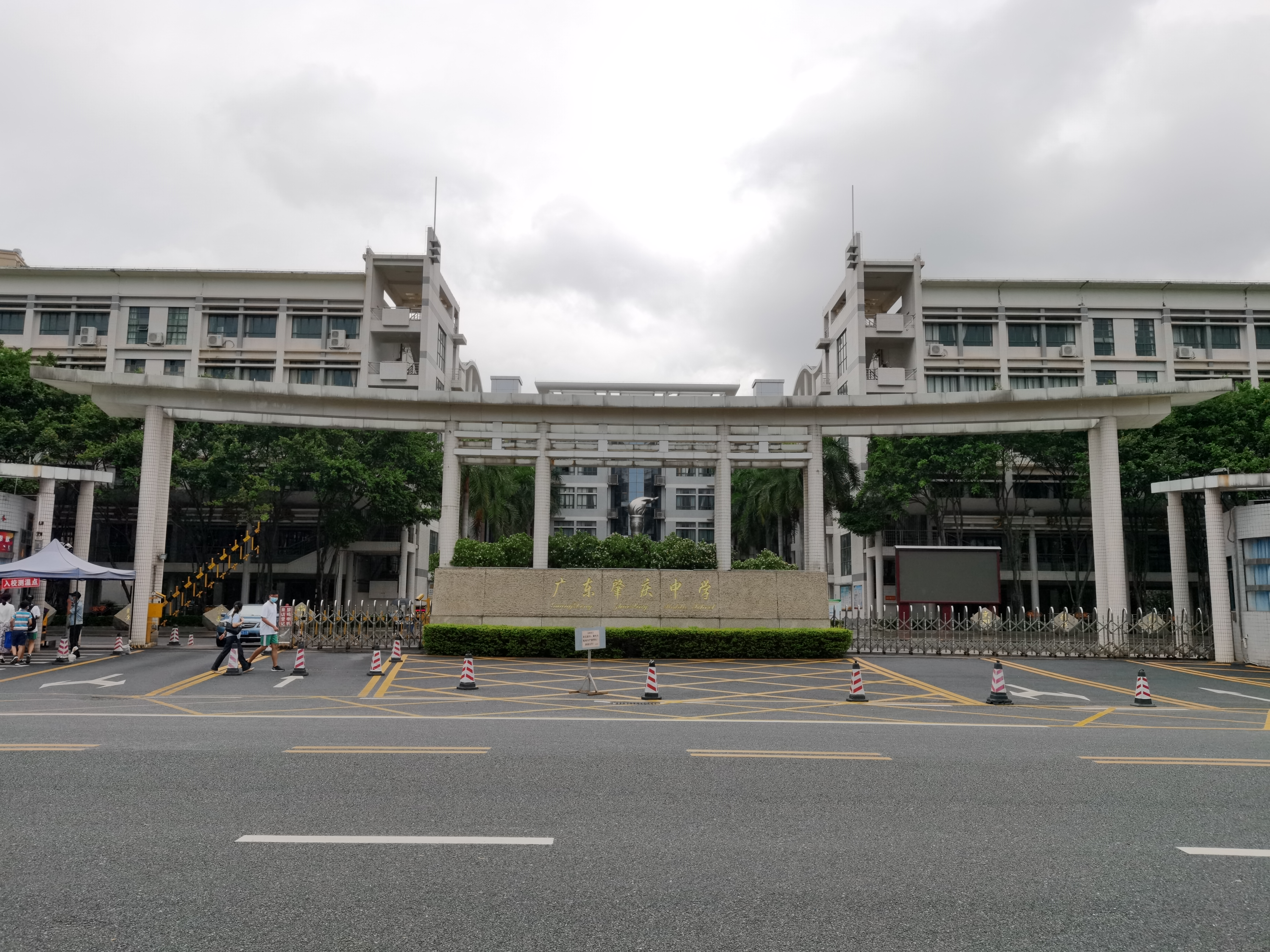 中文（中国大陆）: 这是广东肇庆中学新校区（高中部）的校门，拍摄于2020年8月的阴雨天。